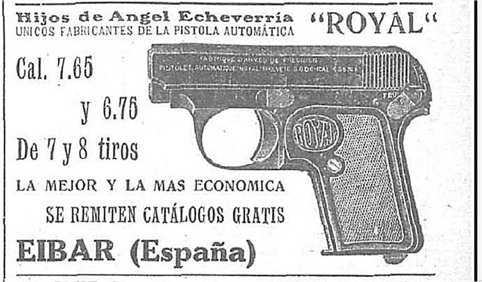 Royal pistola automatica- inserzione pubblòicitaria del 13.7.1911 su Nuevo Mundo di Madrid - Hijos de Angel Echeverria, unico fabricantes de la pistola automatica cal.7.65 y 6.76 de 7 y 8 tiros - la mejoer y la mas economica se remiten catalogos gratis EIBAR (España)